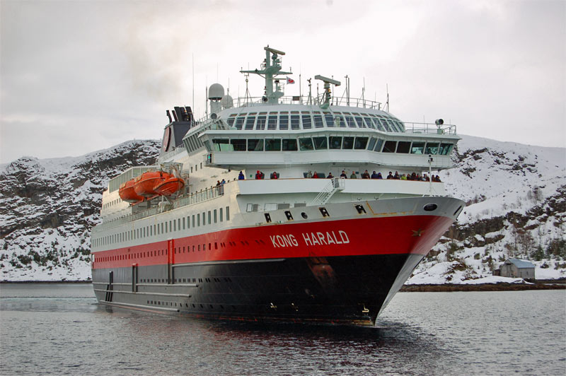 Die Kong Harald legt im Hafen von Torvik an.